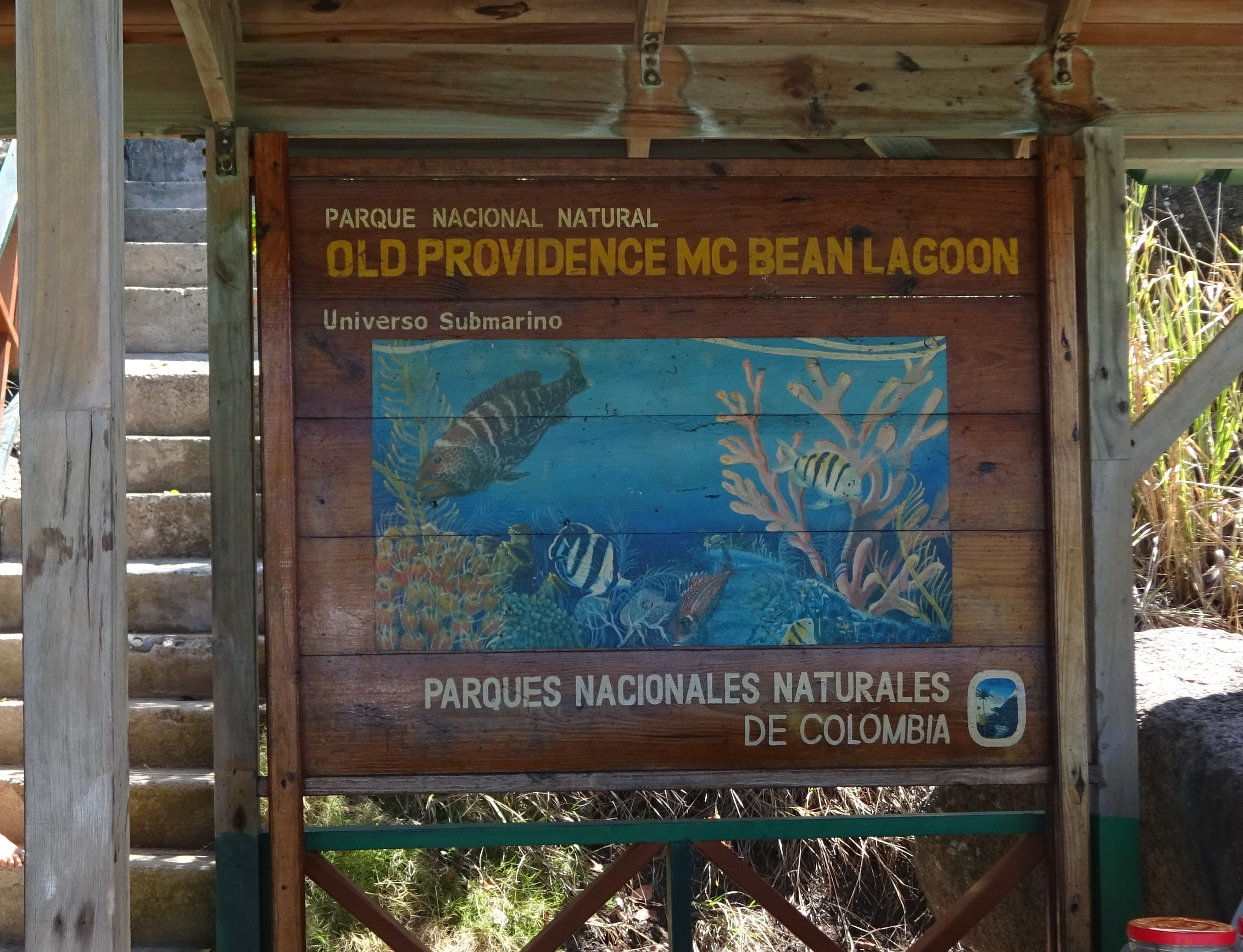 Entrada al parque nacional natural Old Providence McBean Lagoon en Cayo Cangrejo.